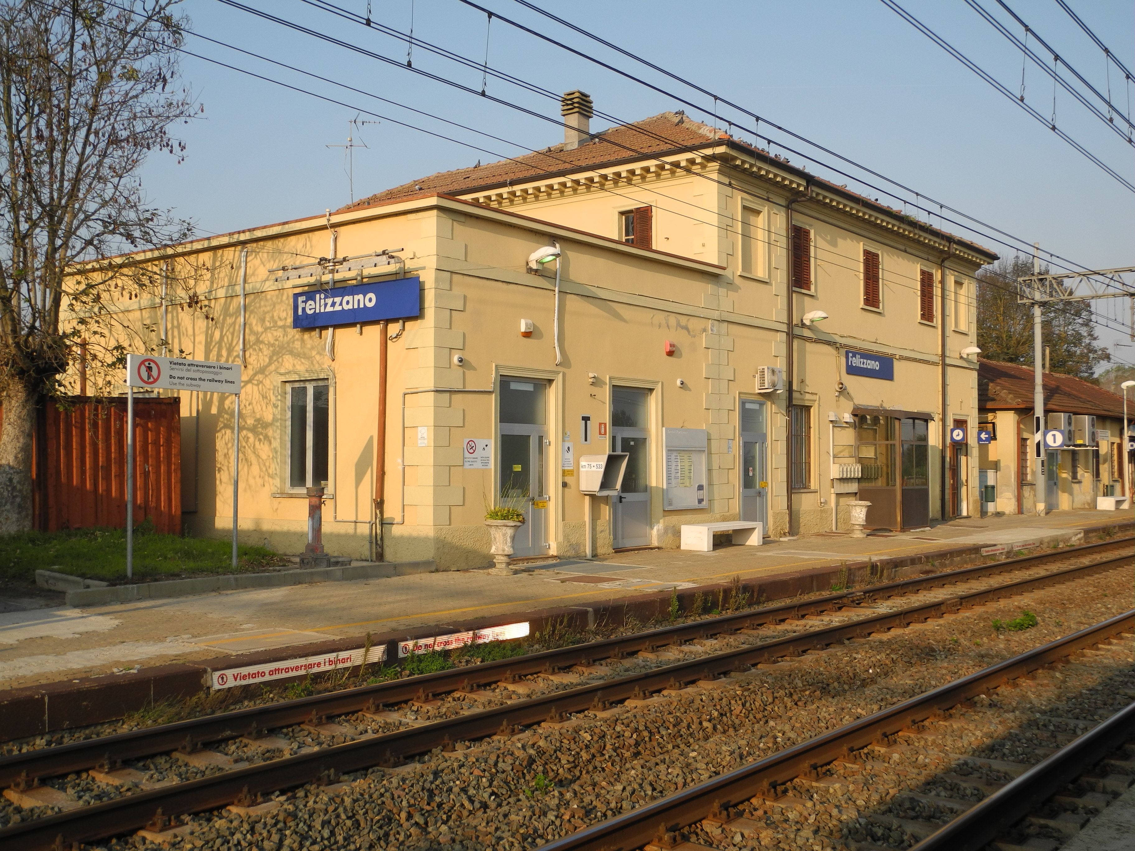 La stazione di Felizzano (AL), Italia.